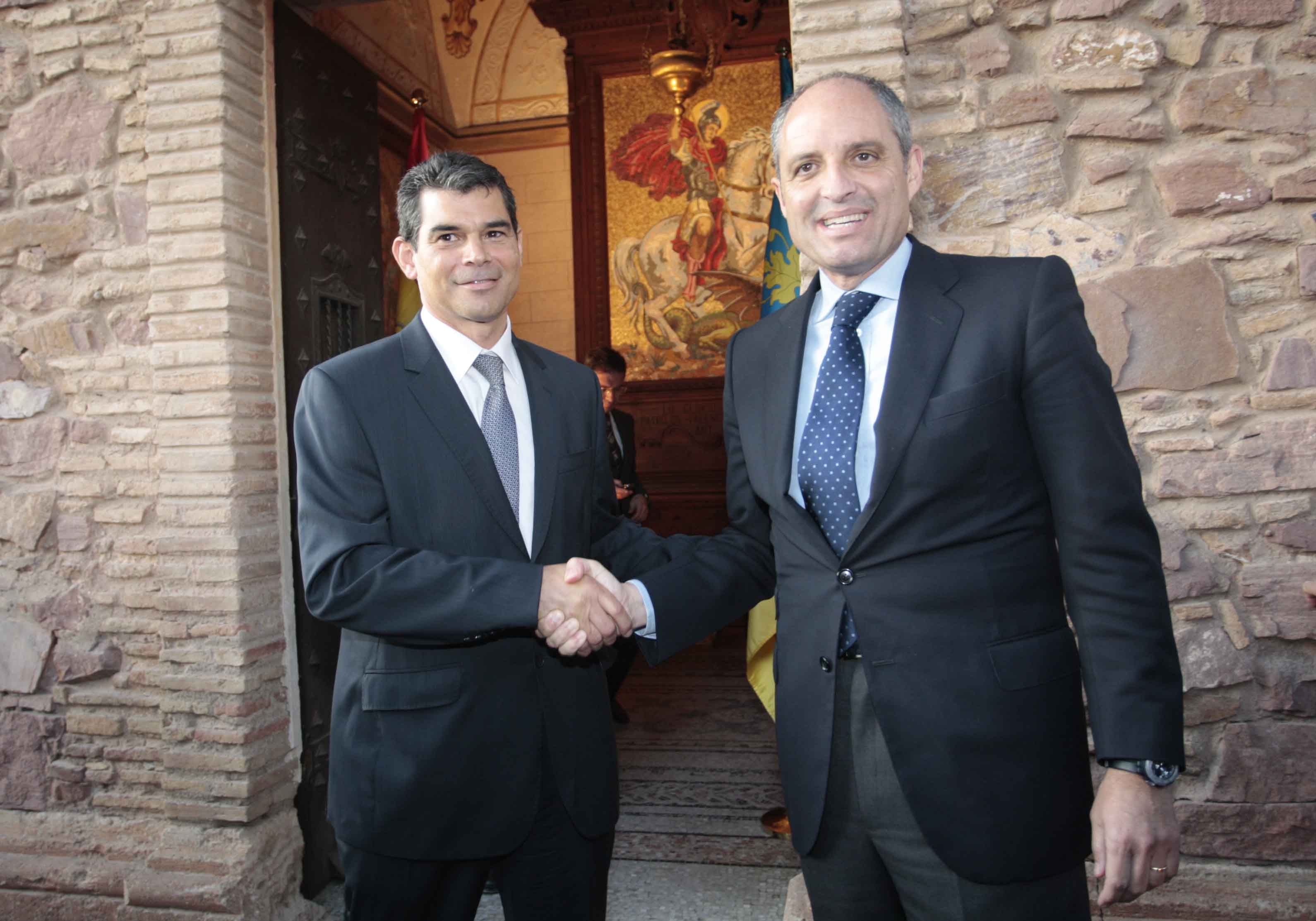 Miralles i Camps a l'acte que significà la mort d'Unió Valenciana